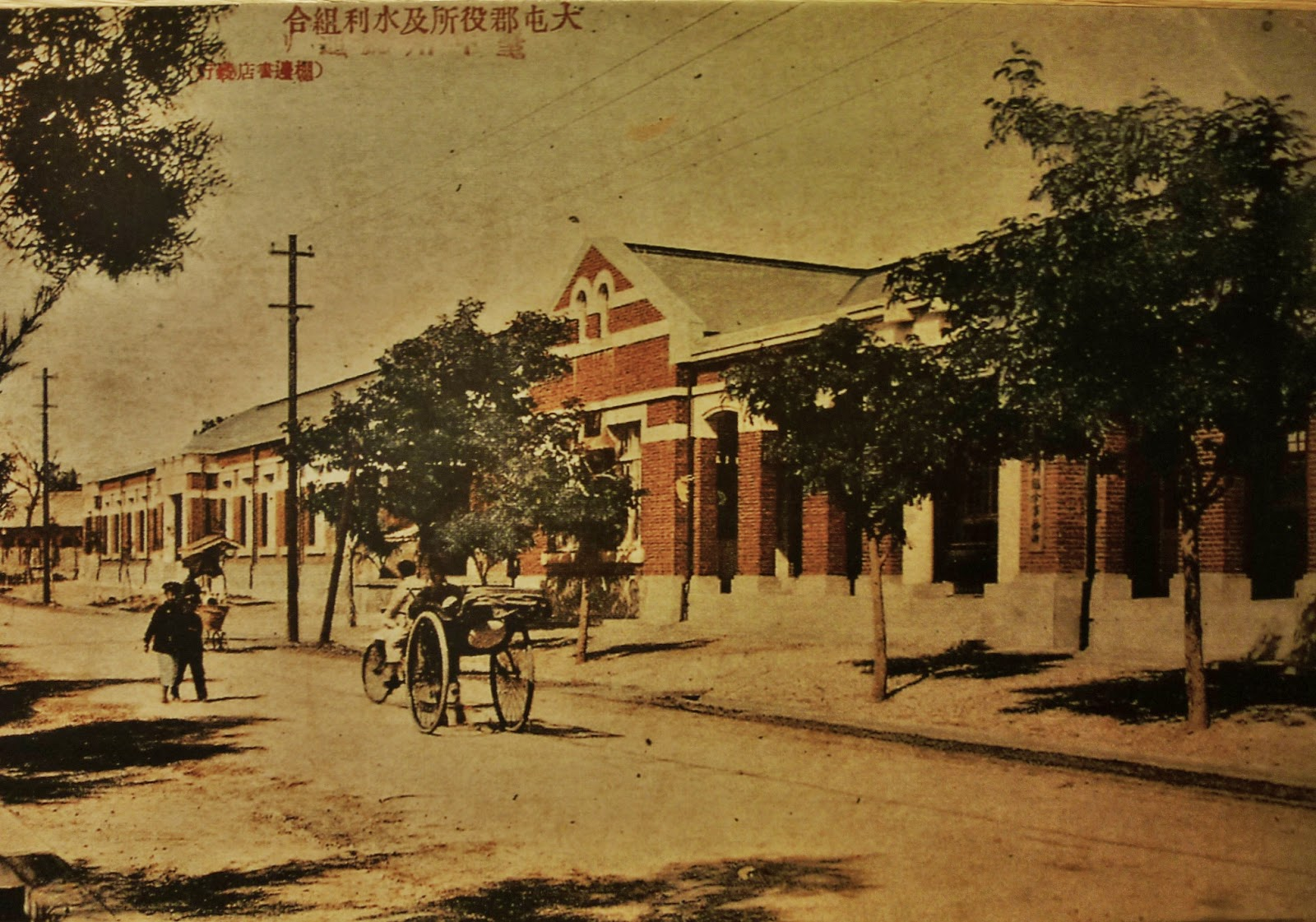 大屯郡役所（圖左）與水利組合（圖右），前方道路為今臺中市民生路 Bân-lâm-gú: Toā-tūn-kūn ia̍h-só͘ (tó) kap Chúi-lī Cho͘-ha̍p (chiàⁿ), thâu-chêng ê chhia-lō͘ sī kin-á-ji̍t ê Tâi-tiong-chhī Bîn-seng-lō͘